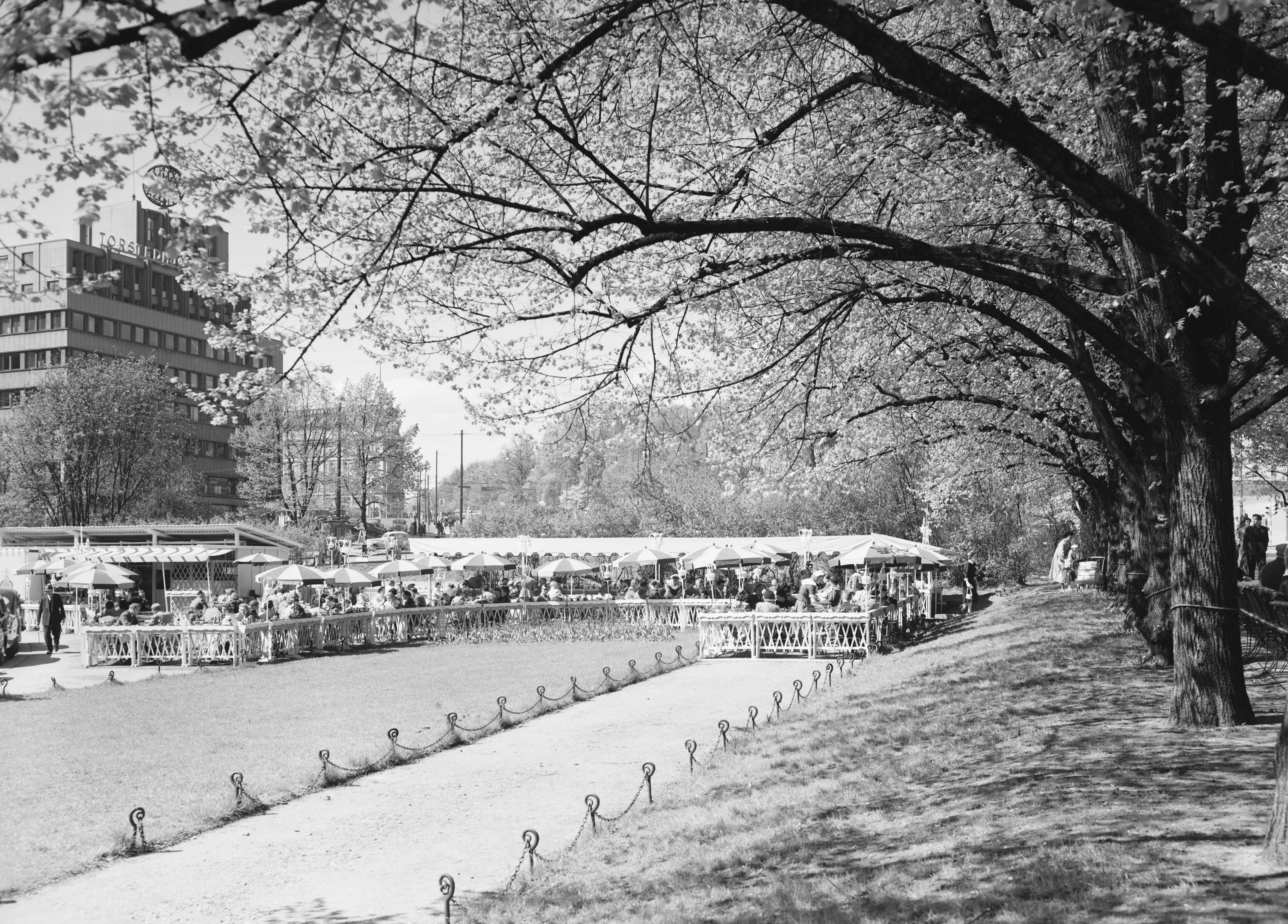 Bildet er hentet fra Nasjonalbibliotekets bildesamling. Anmerkninger til bildet var: Fotograf ukjent Oslo, Oslo, Oslo